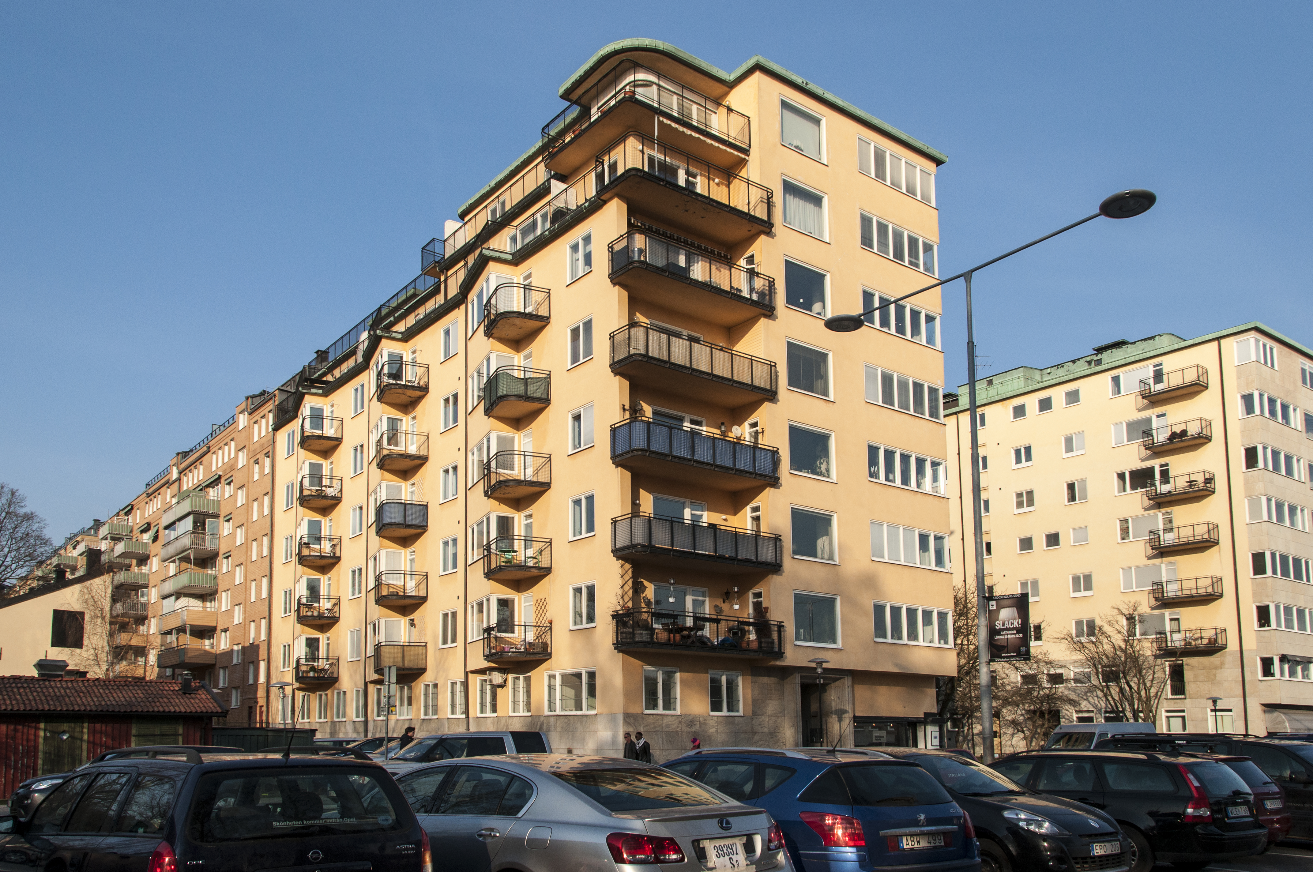 Mullbärsträdet 3, Norr Mälarstrand 38, Nybyggnadsår 1936 - 1937 , Anders Dunder (Byggmästare) Karl Bergström (Byggmästare) Stockholms Bryggerier AB (Byggherre) Ture Ryberg (Arkitekt)